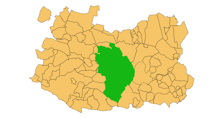 Comarca Campo de Calatrava